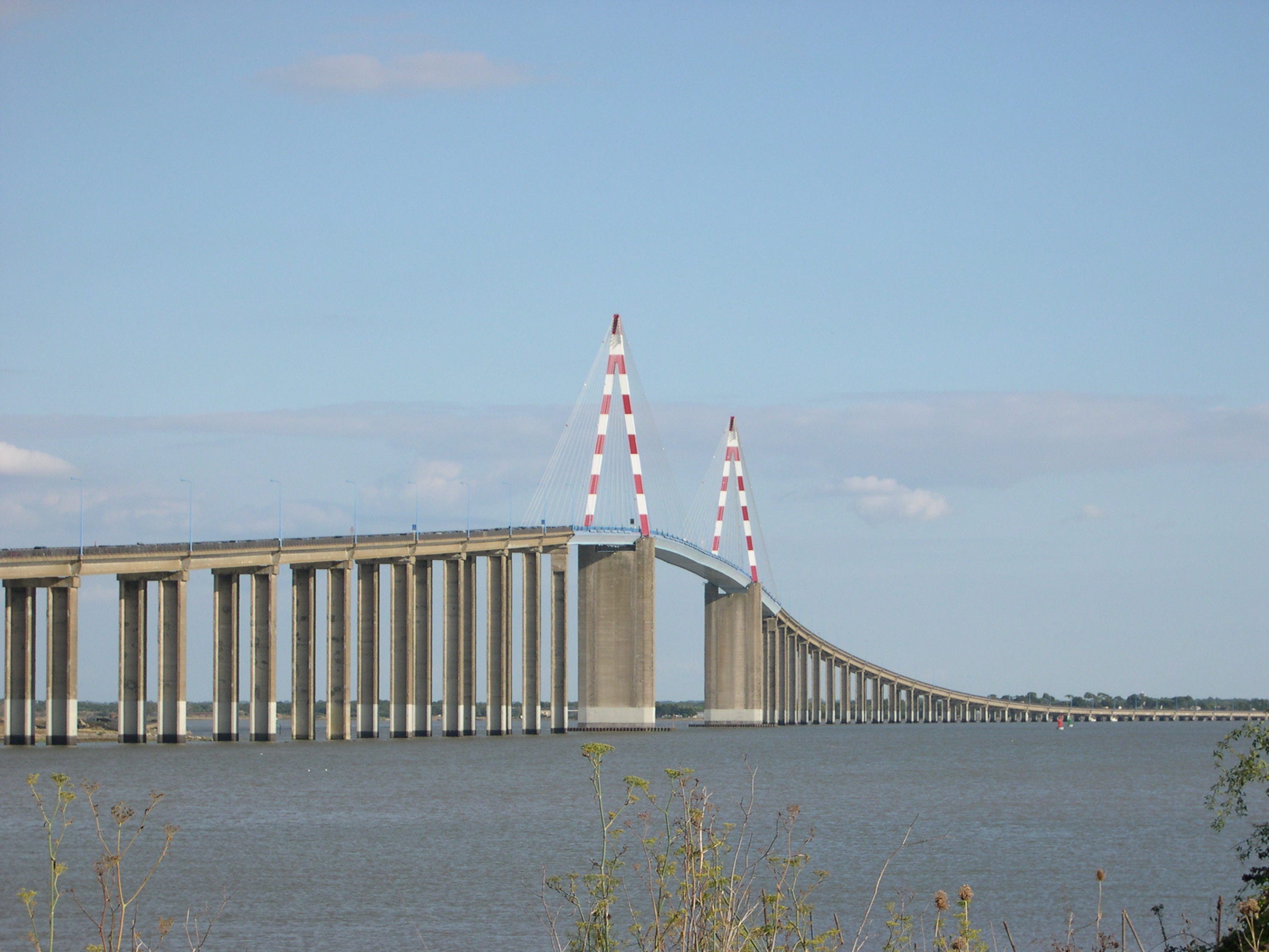 Le Pont de Saint-Nazaire vu depuis Penhoët